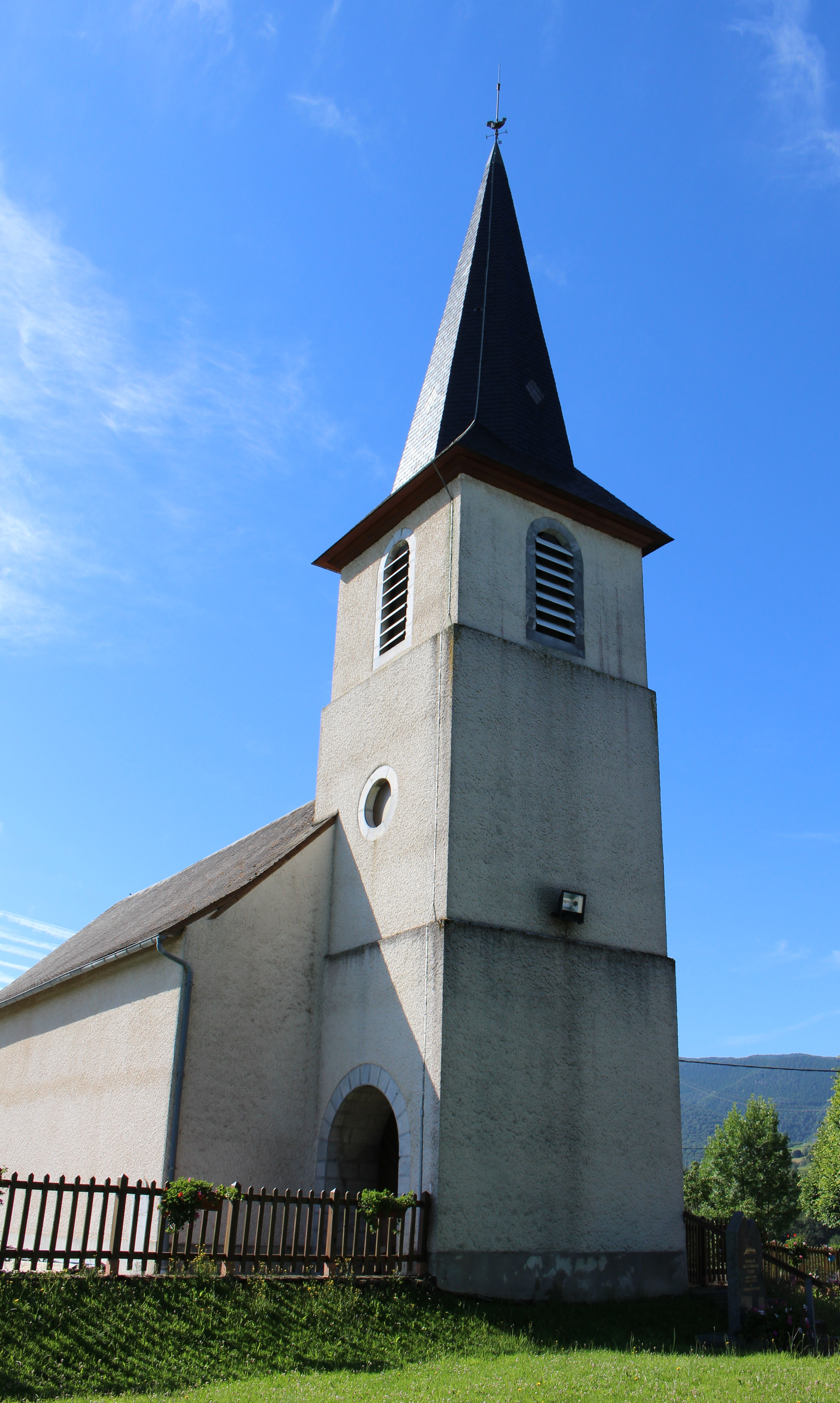 Église Saint-Martin d'Uzer (Hautes-Pyrénées)